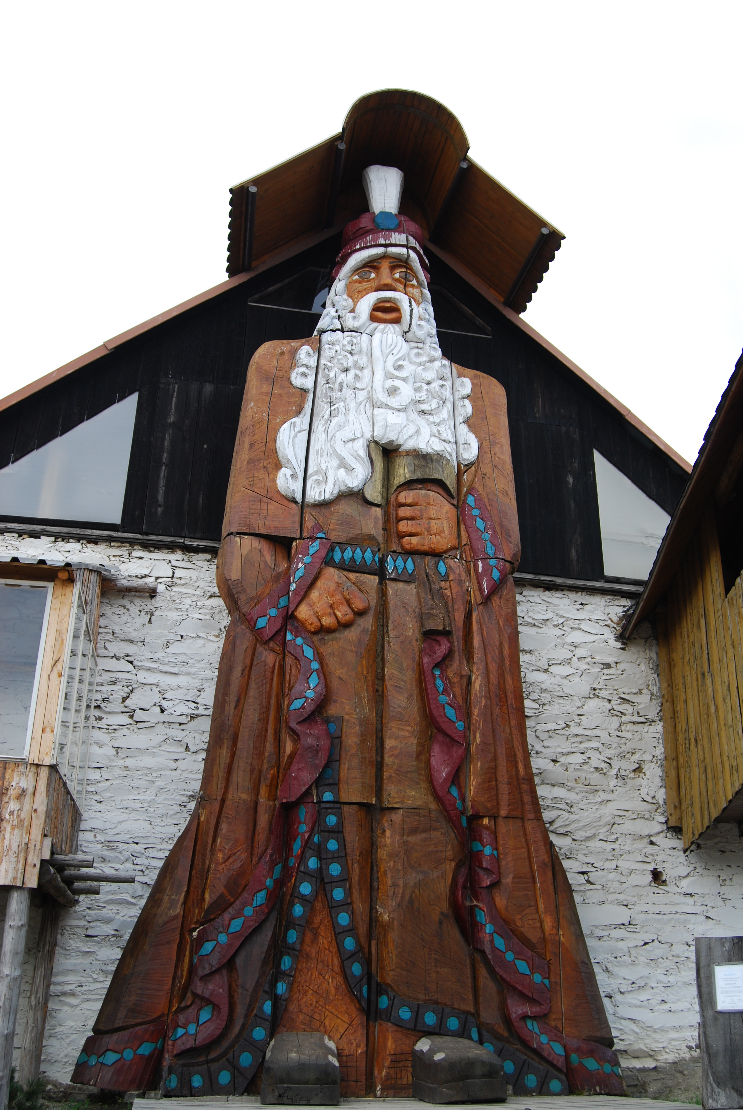 Pradědova galerie U Halouzků. Jednotlivé exponáty. Obec Jiříkov (německy Girsig) v okrese Bruntál, kraj Moravskoslezský. Česká republika. Object location49° 51′ 11.83″ N, 17° 16′ 37.58″ E